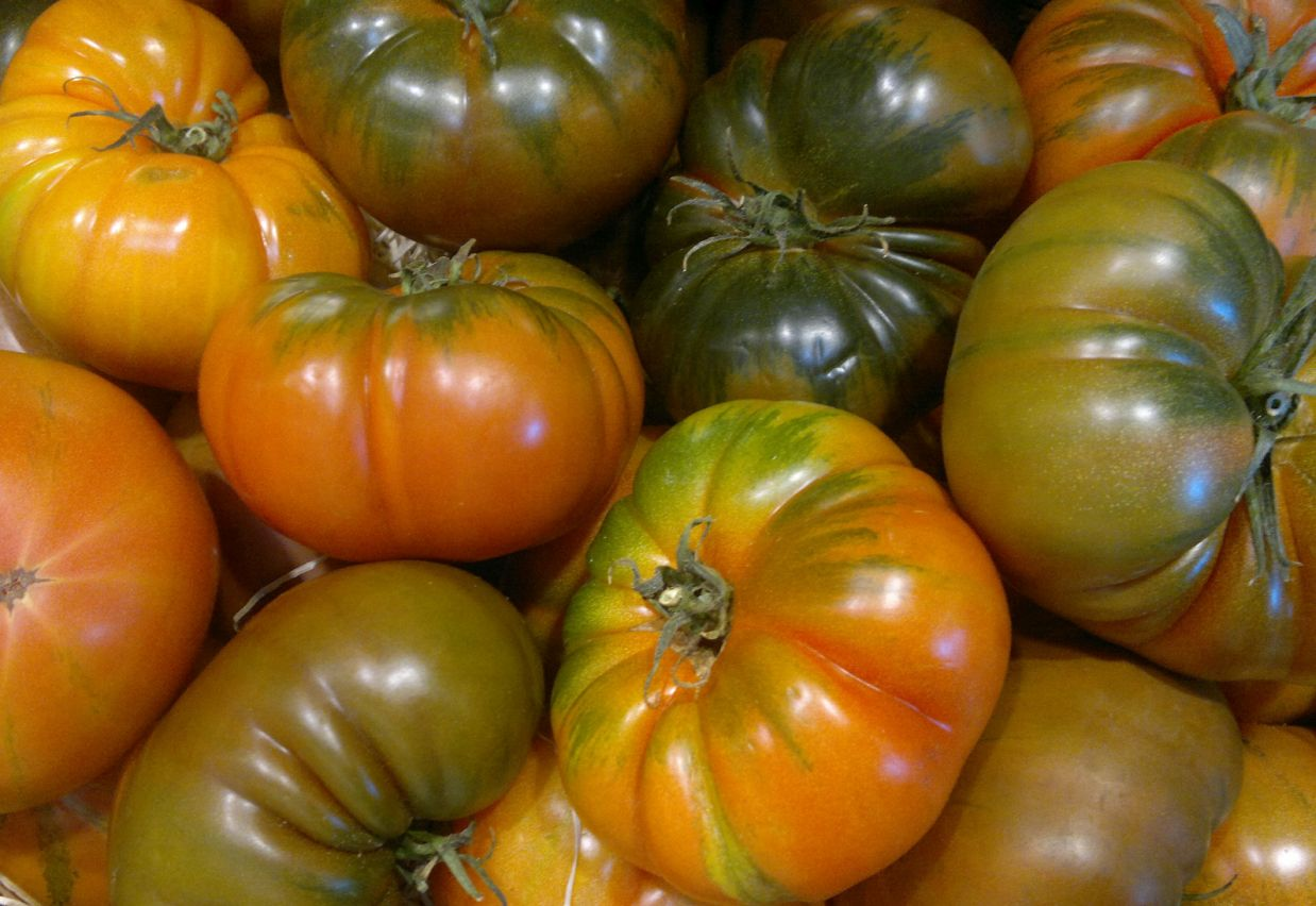 Tomàquets raf.